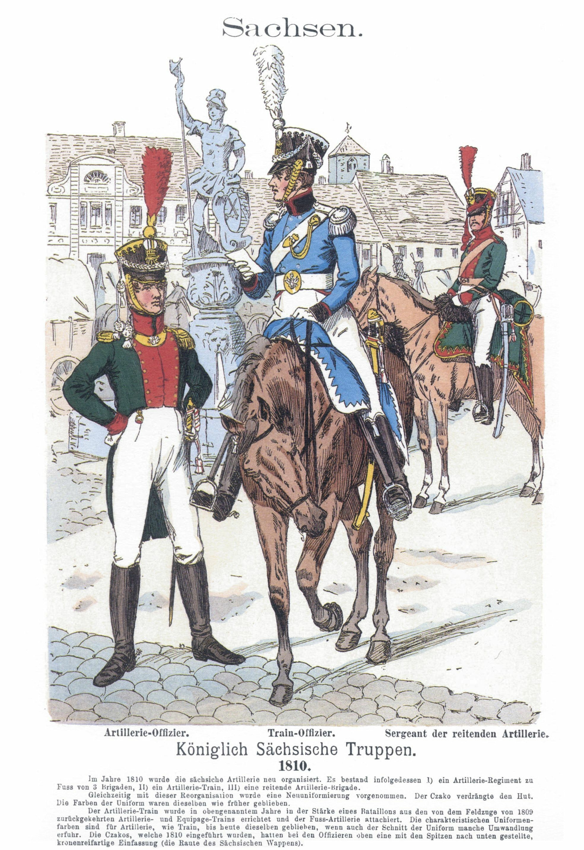 Sächsische Armee: Artillerie, Pioniere und Train